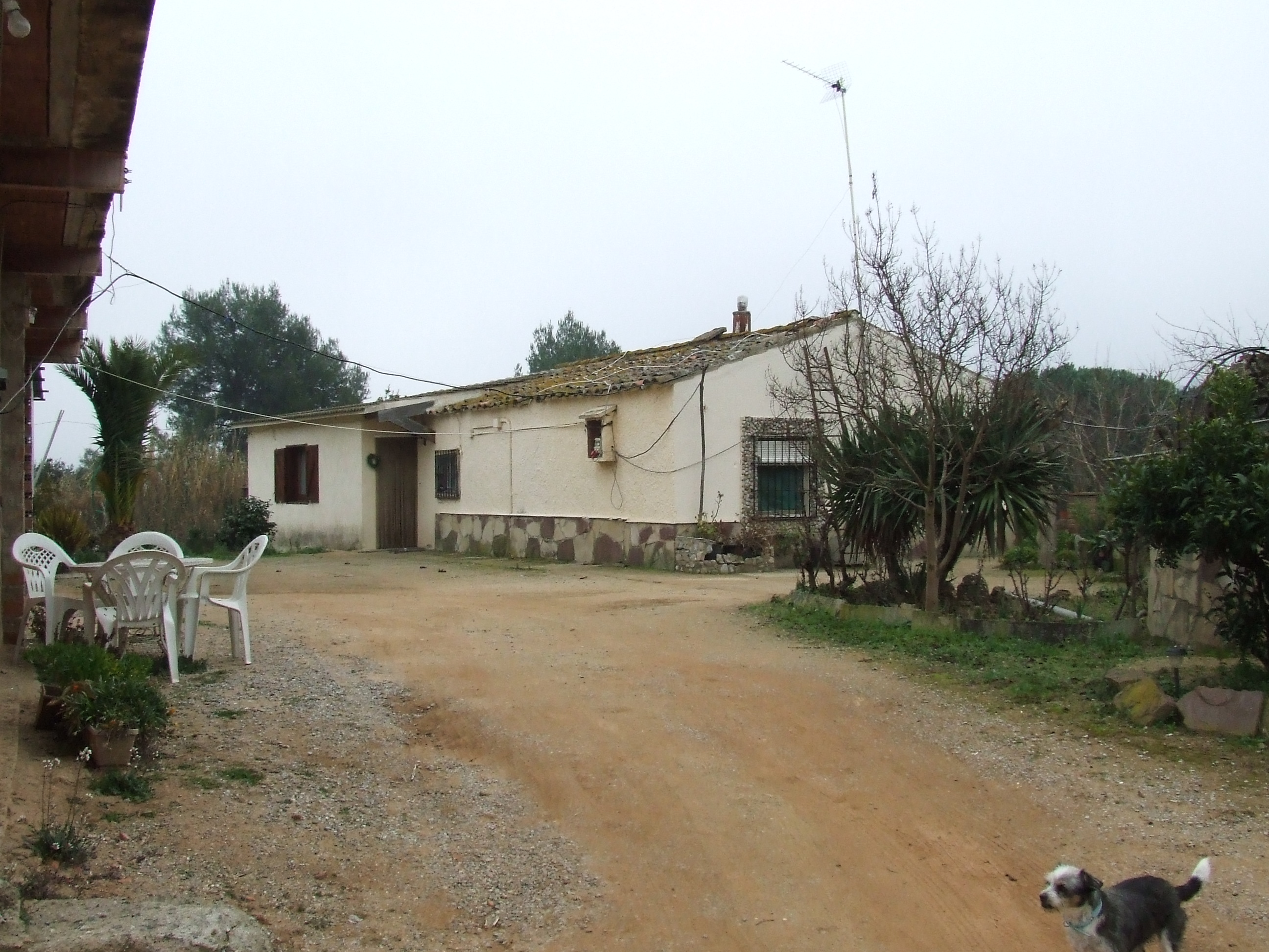 Can Llor (Bigues, Bigues i Riells, Vallès Oriental)